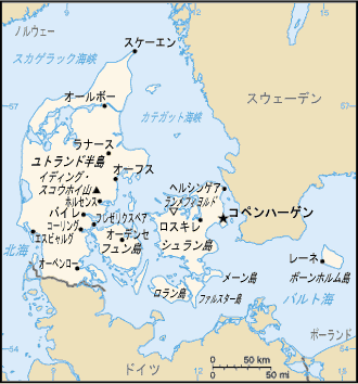 デンマークの地図 - CIA Factbookより日本語化